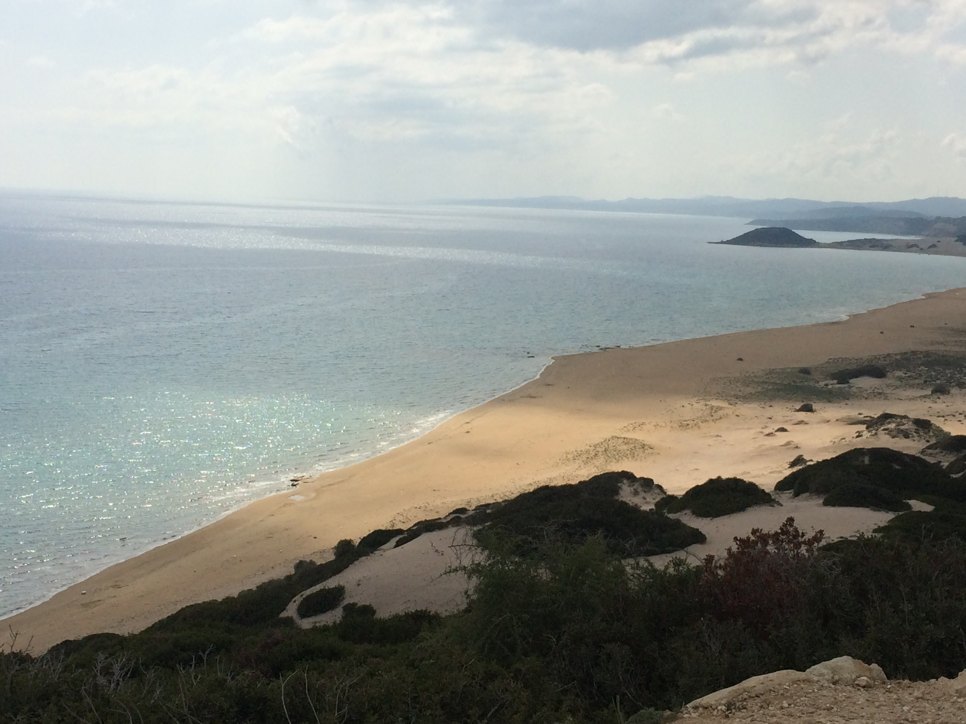 Golden Beach-Cyprus